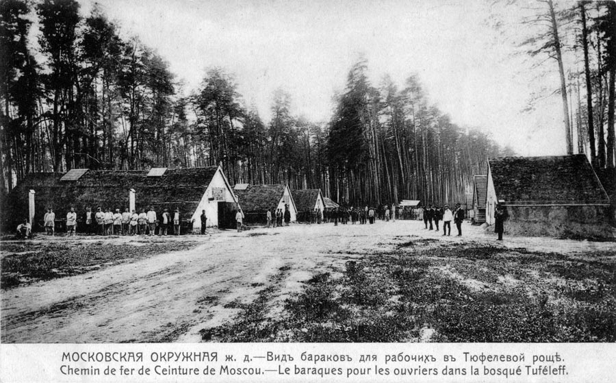 Бараки строителей МОЖД в Тюфелевой роще у реки